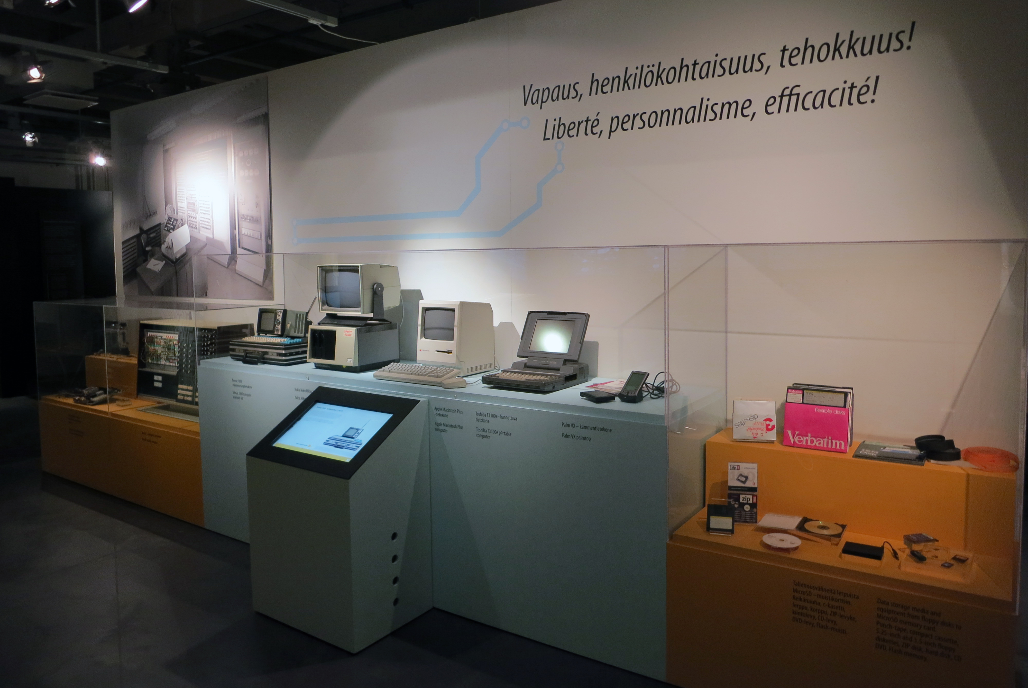 Kuva mediamuseo Rupriikista Finlaysonin alueen näyttelytiloista.